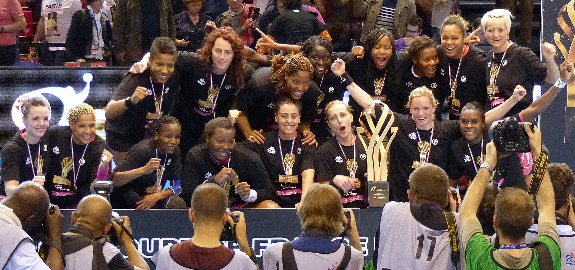 Fleury Loiret Handball vainqueur de la Coupe de France féminine de handball. Le 24 mai 2014 à la Halle Carpentier (Paris 13e)